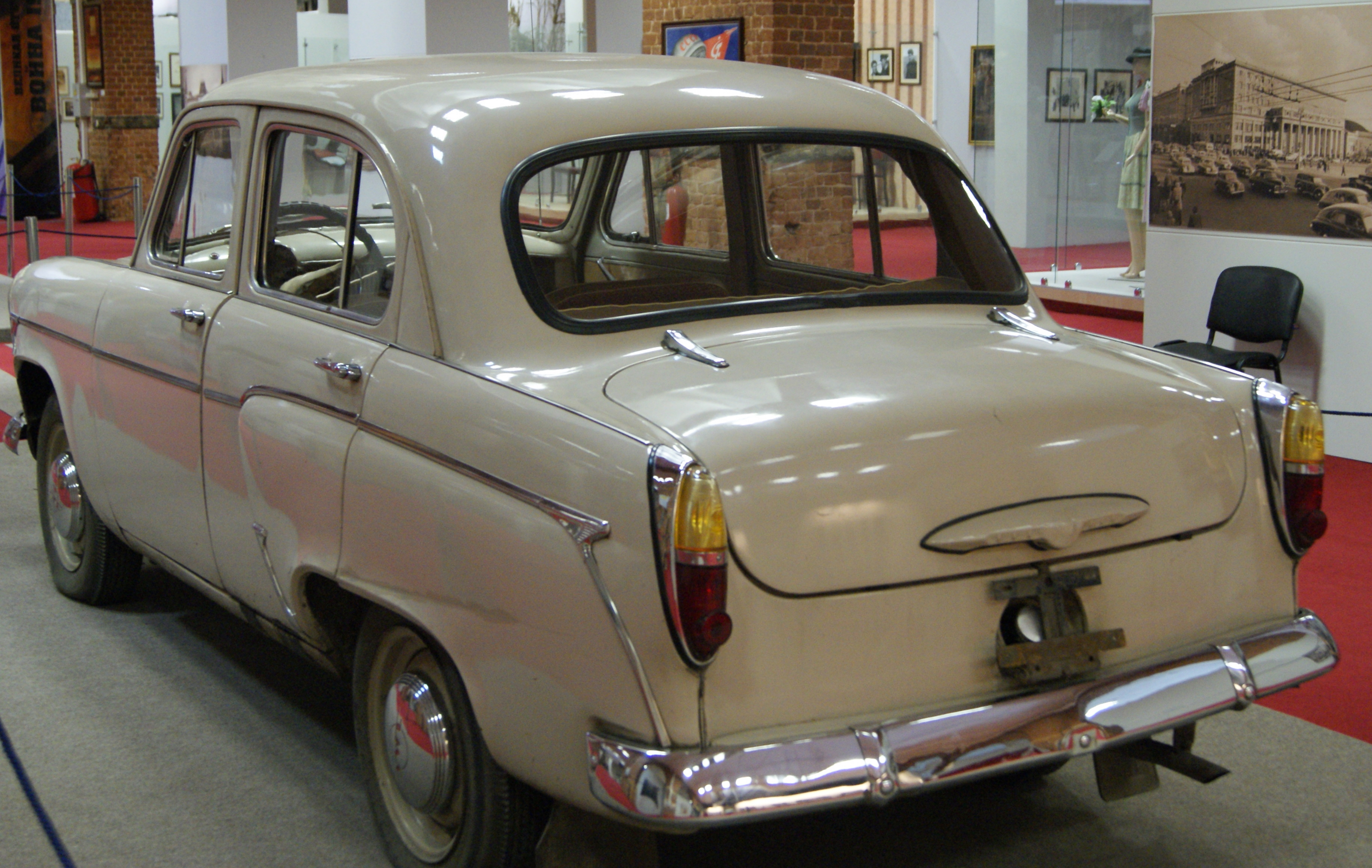 Moskvitch 403